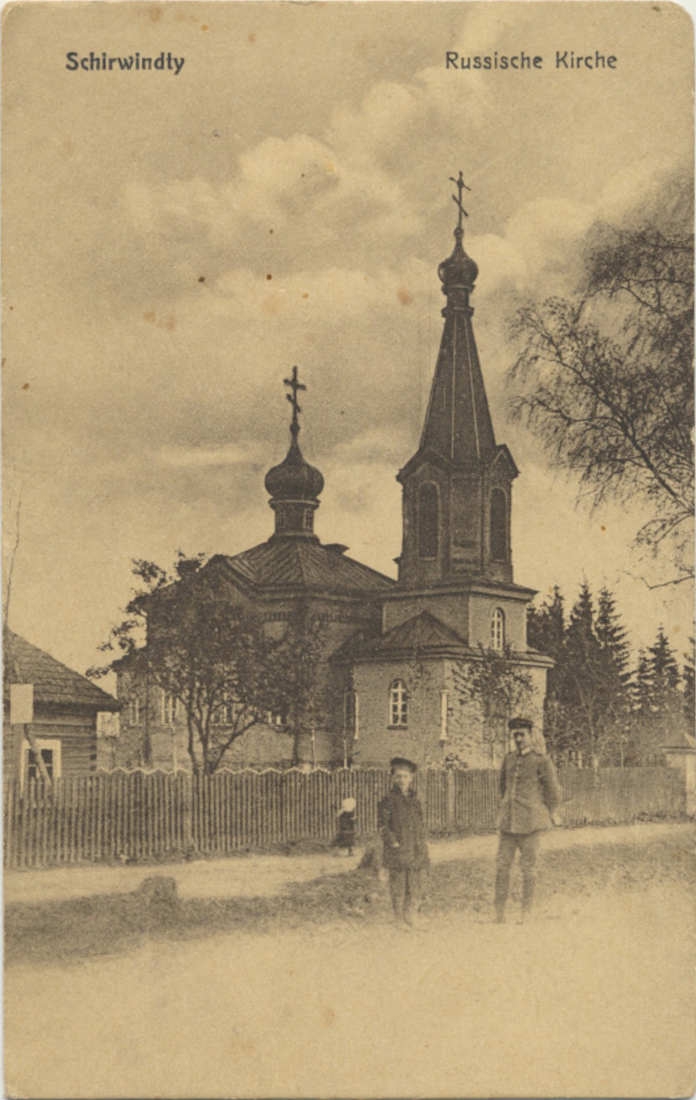 Беларуская (тарашкевіца): Шырвінты (Šyrvinty). Царква-мураўёўка